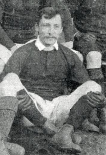 Edmond Mamelle, ingénieur agronome, en 1899 (Stade français). Son père également prénommé Edmond, décédé en 1926, fut Président du Stade français de la fin des années 1890 à 1914 (au moins). Edmond fils fut Champion de France de rugby à XV en 1894, 1895, 1897, 1898, et 1901, ainsi que vice-champion en 1899.